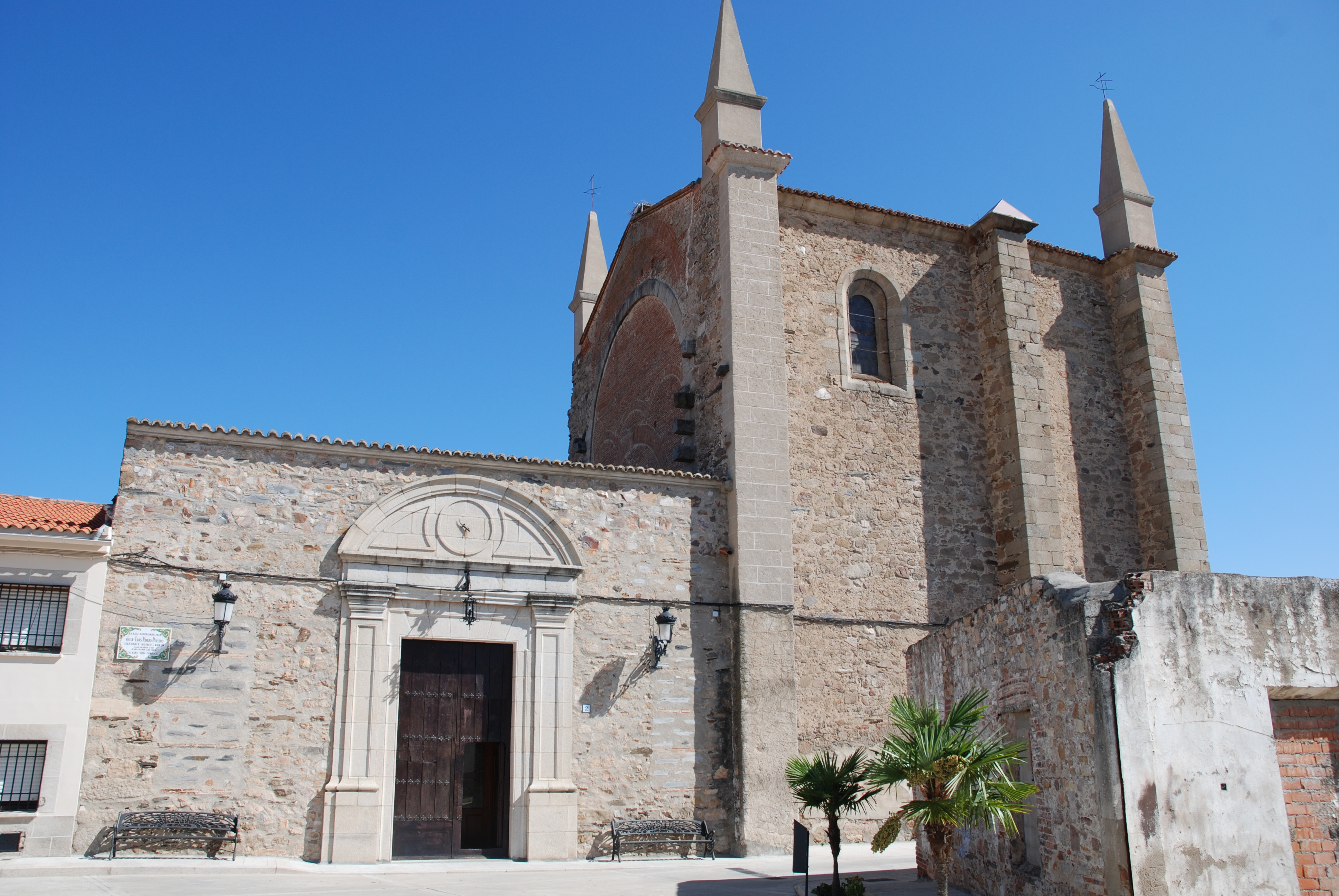 Ermita de la Soledad (Casatejada, Cáceres)